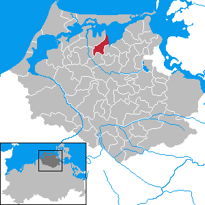 Kenz-Küstrow in Mecklenburg-Vorpommern - District Nordvorpommern